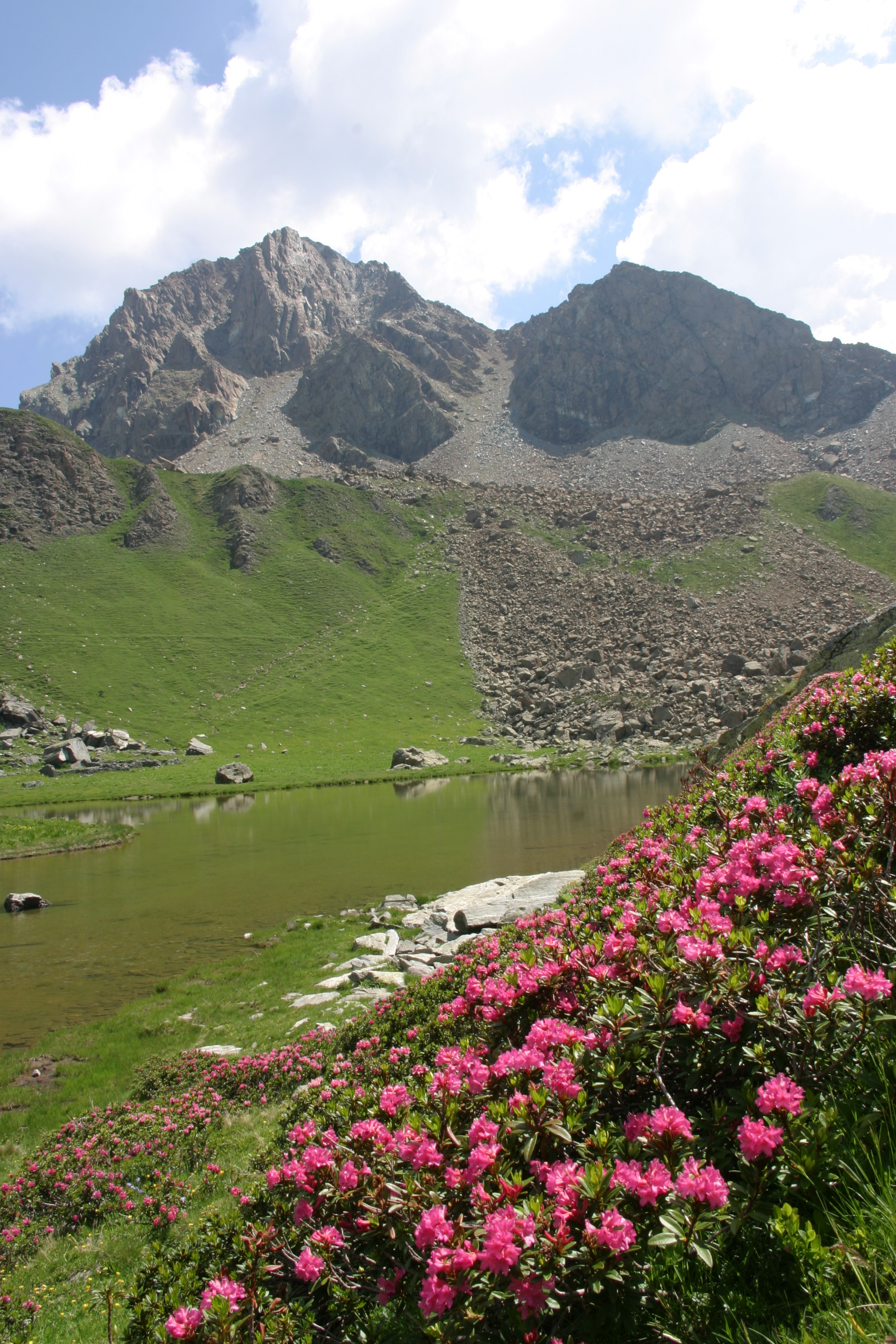 parco naturale Orsiera-Rocciavrè (Q2052054)